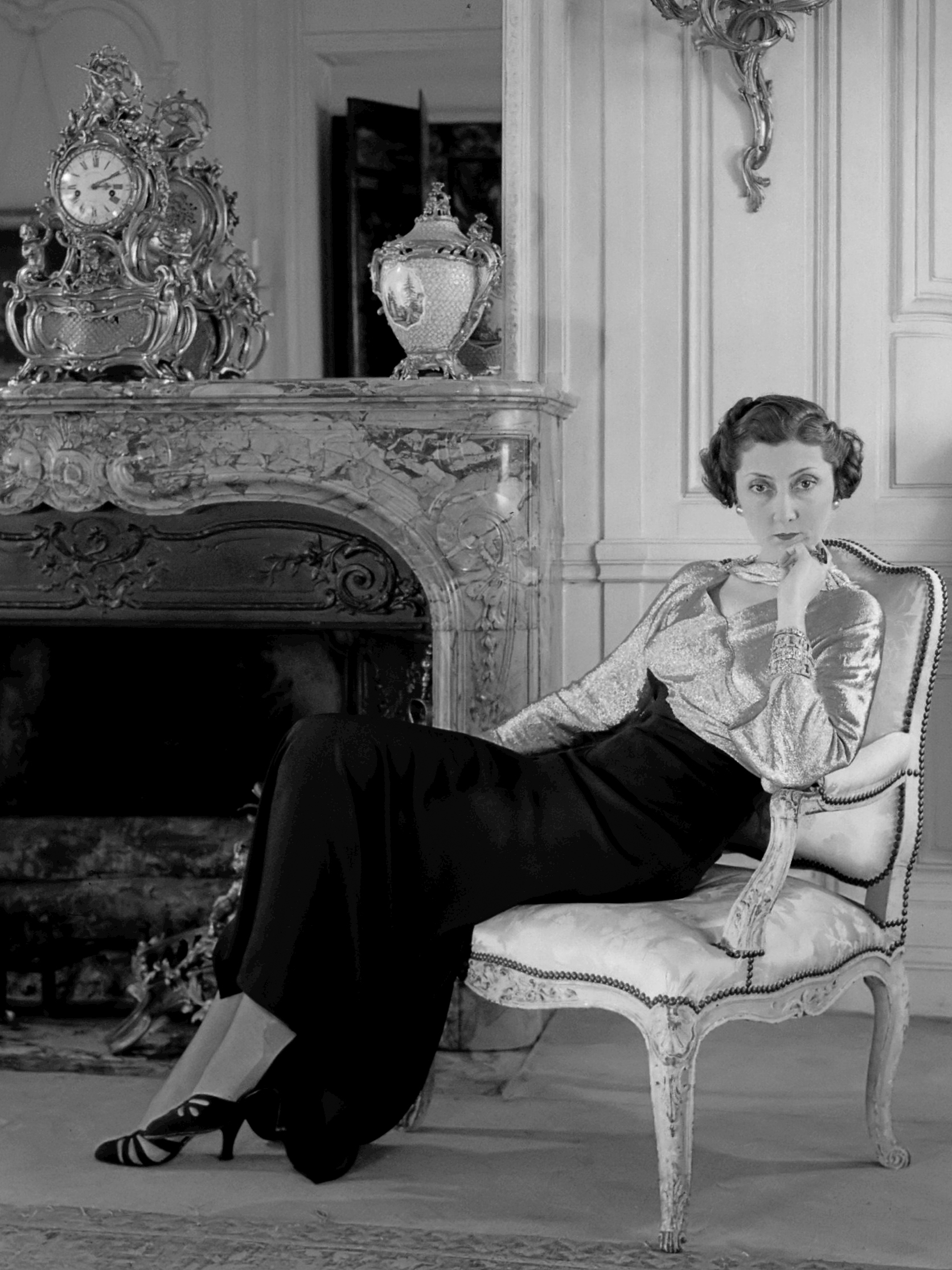 De gravin van Parijs poseert in een hôtel in Parijs in een japon van Paquin 1936